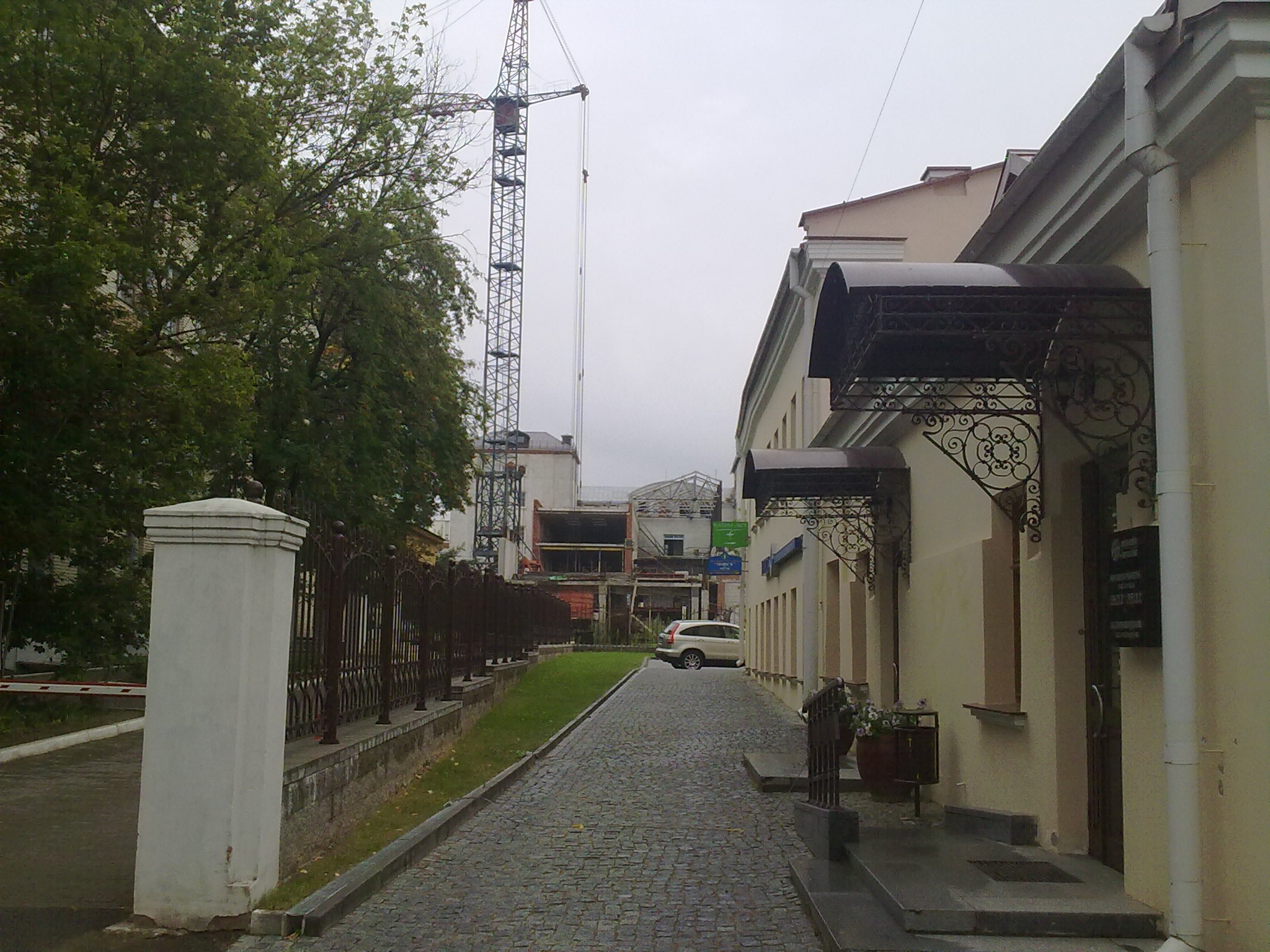 Мінск. вуліца Рэвалюцыйная. 2012